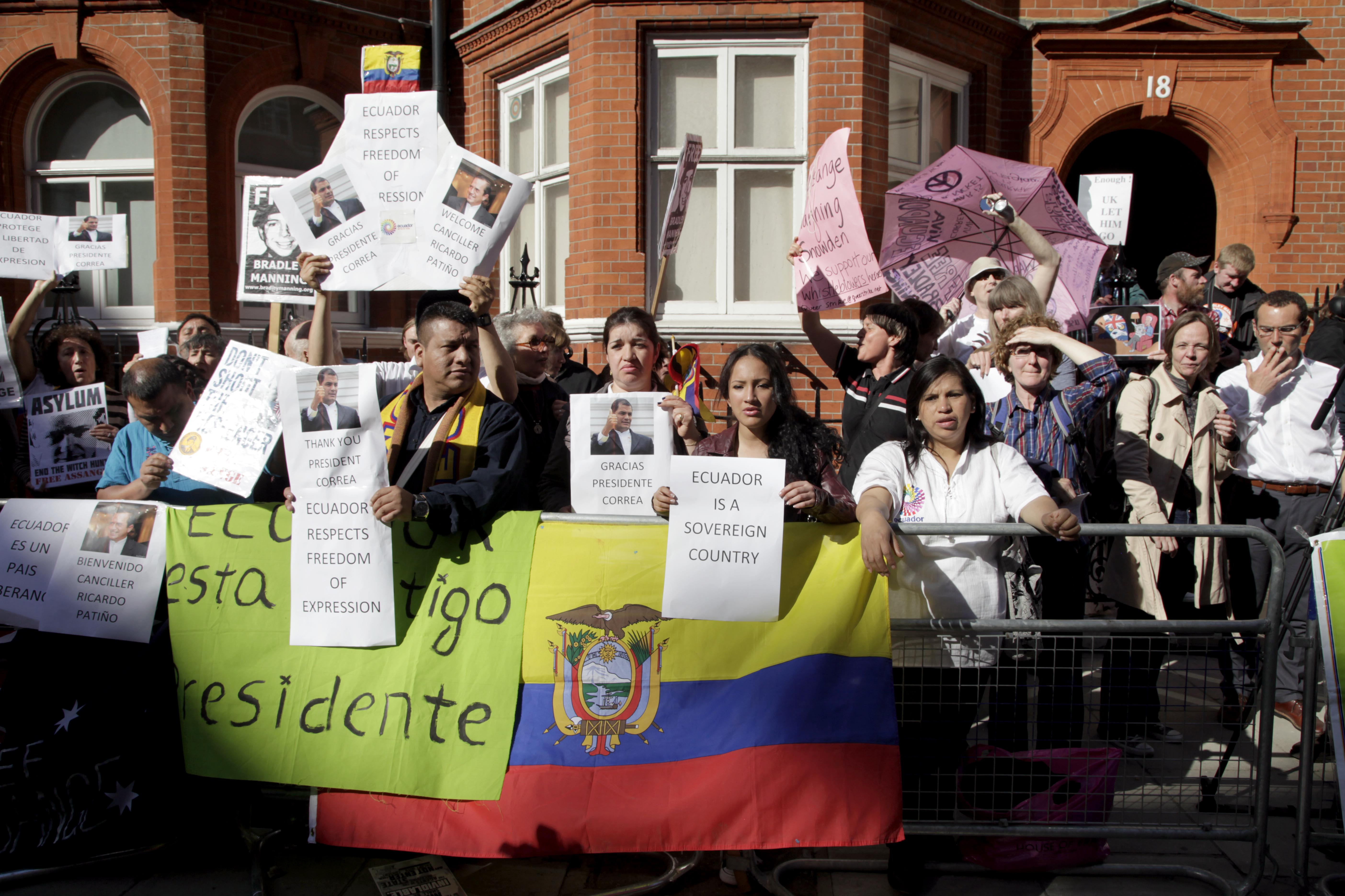 Reino Unido (Londres), 16 de Junio del 2013. El Canciller Ricardo Patiño se reunió con Julian Assange. Foto: Xavier Granja Cedeño/Ministerio de Relaciones Exteriores.